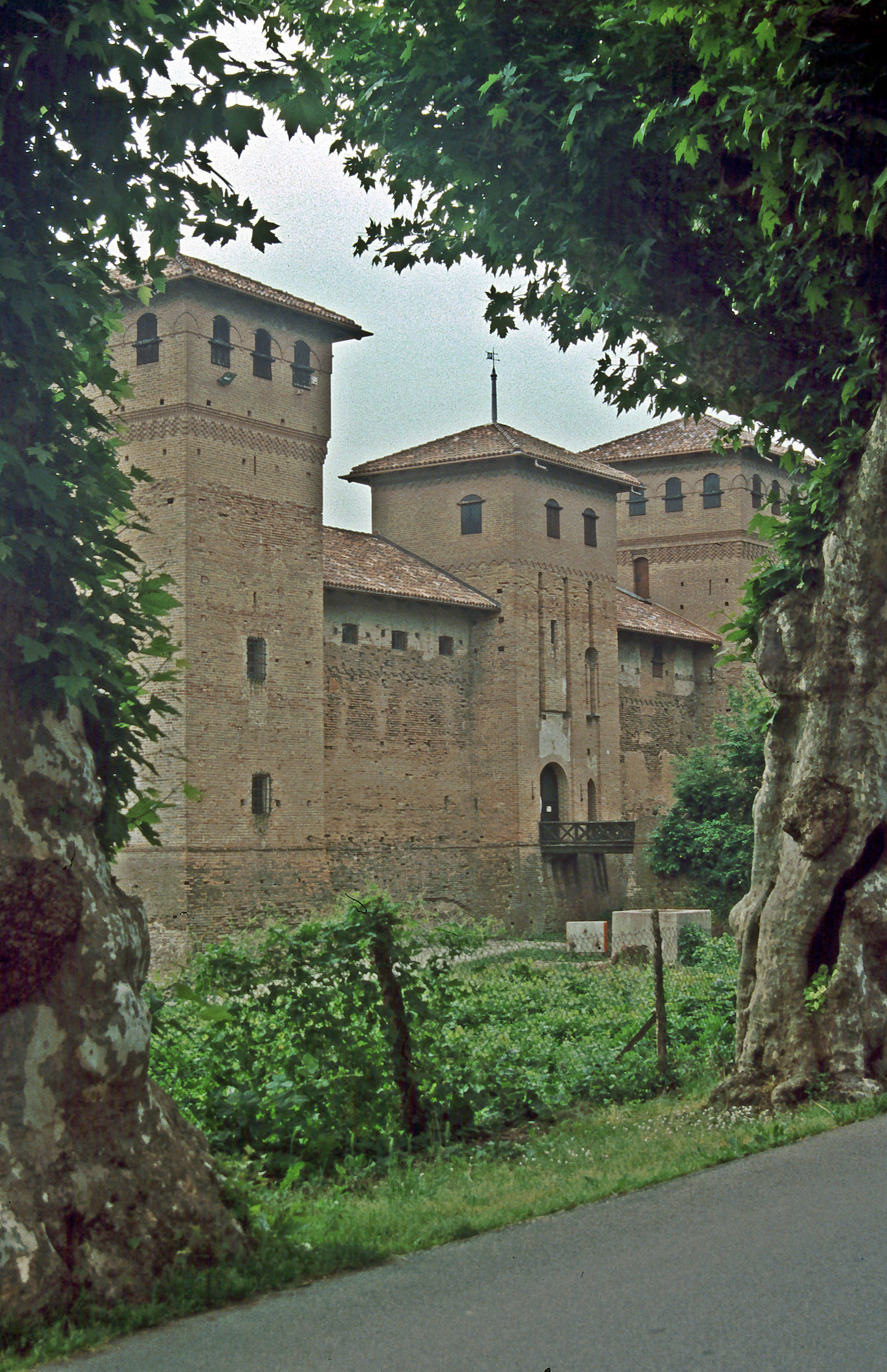 Cherasco, Kastell der Visconti